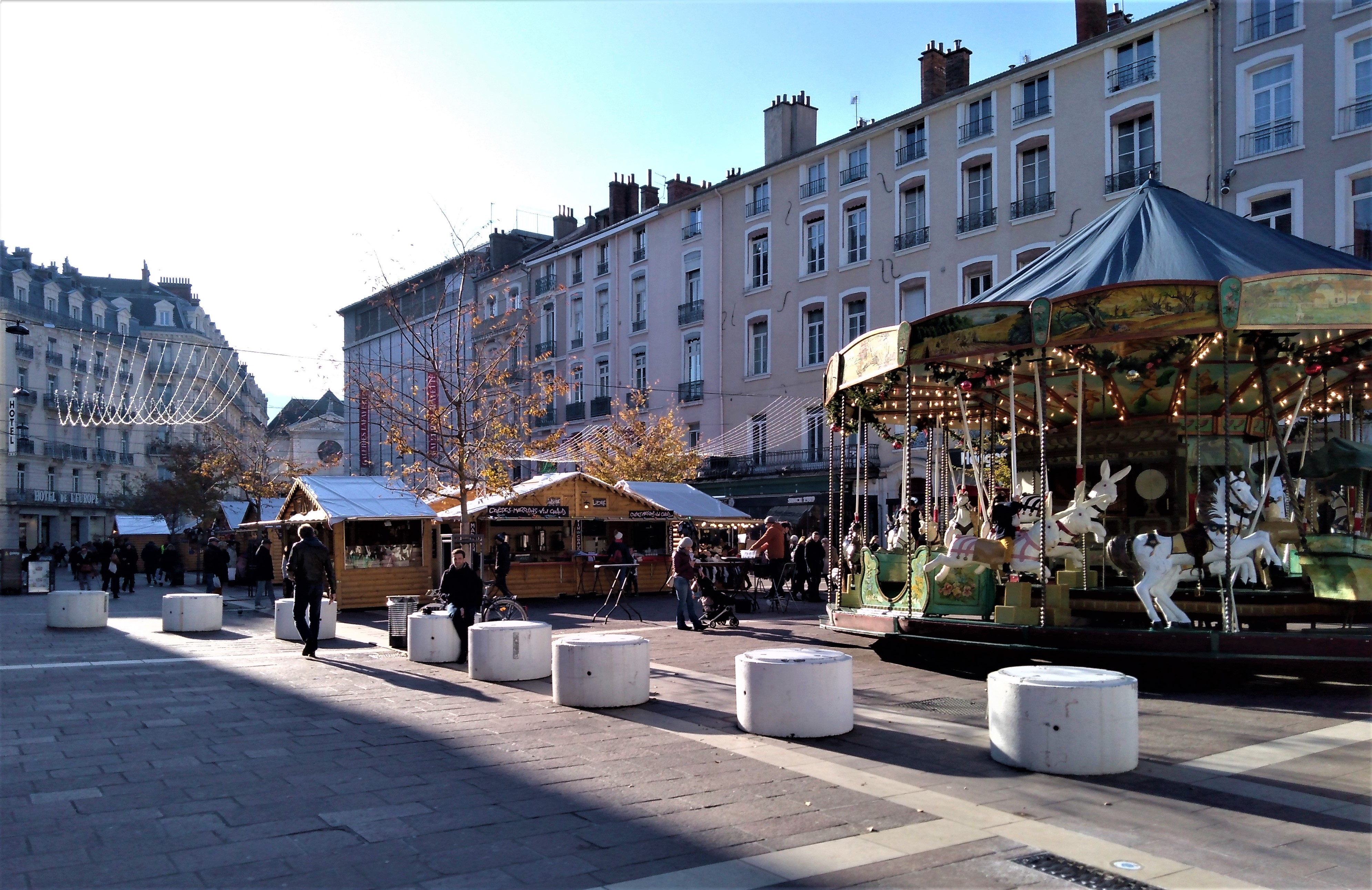 Place Grenette et marché de Noël